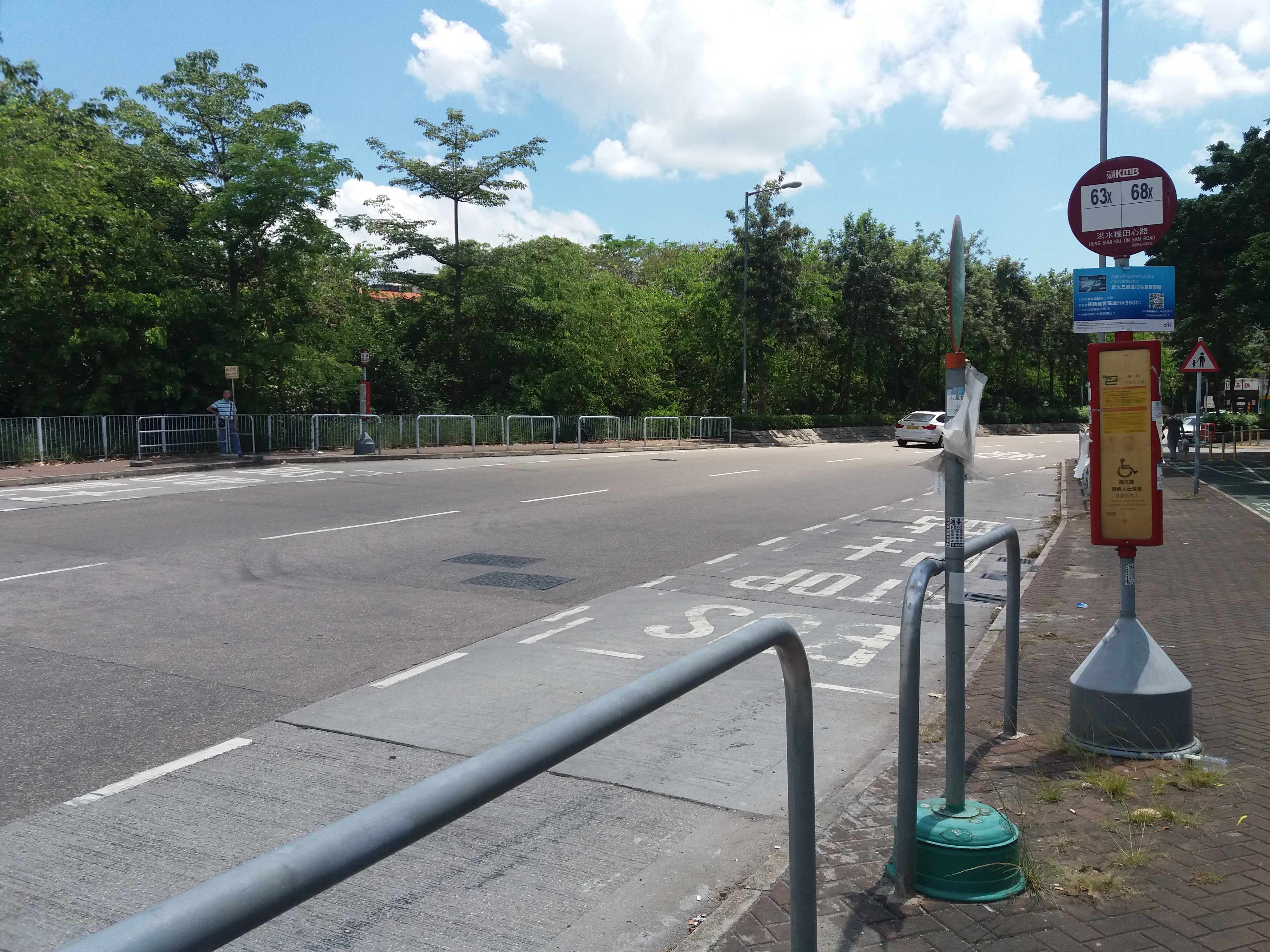 中文（香港）: 洪水橋田心路巴士站